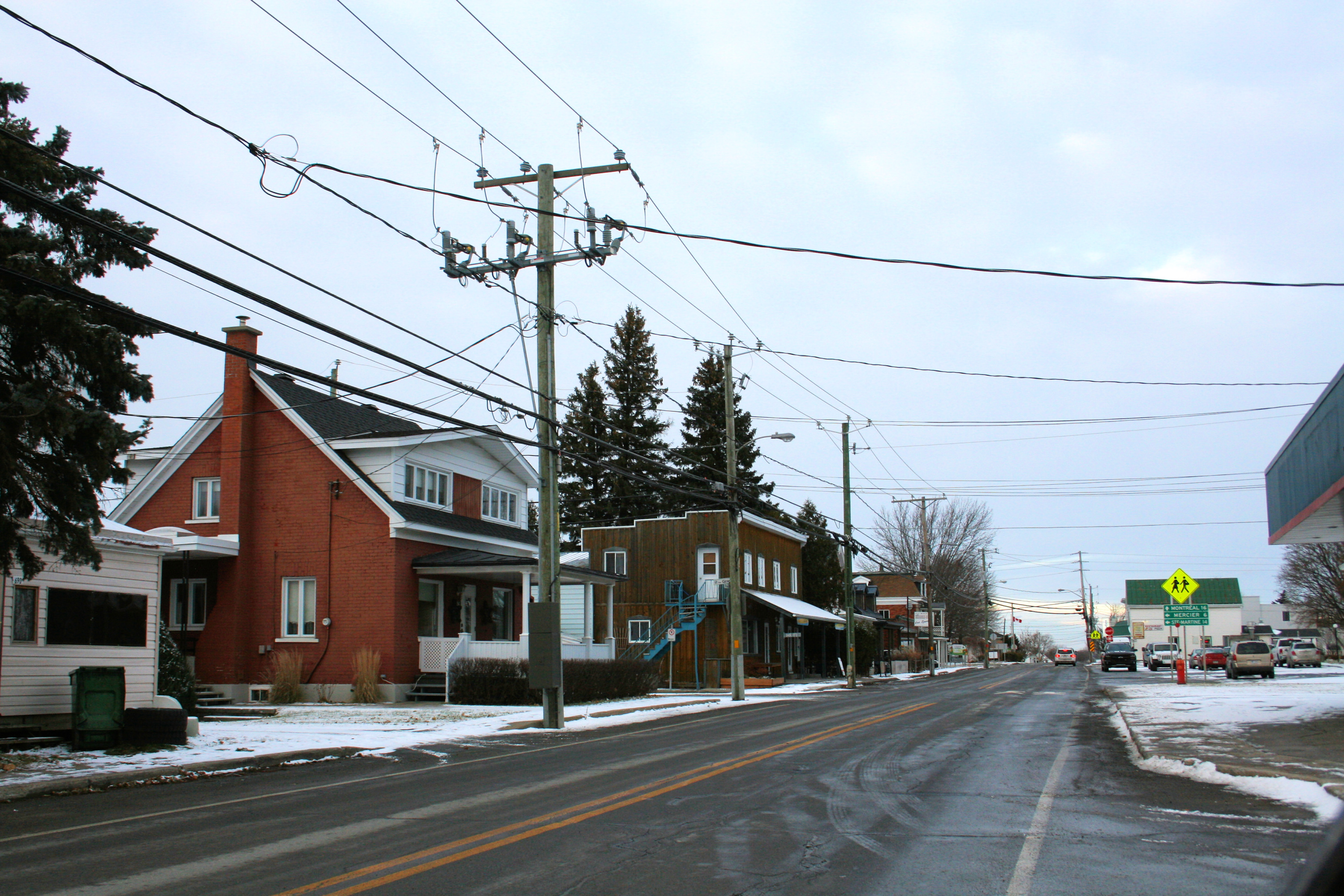 St-Isidore, Quebec, Canada